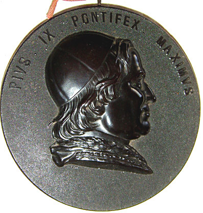 Medaillon aus Bois Durci: Pius IX., Durchm. 11 cm